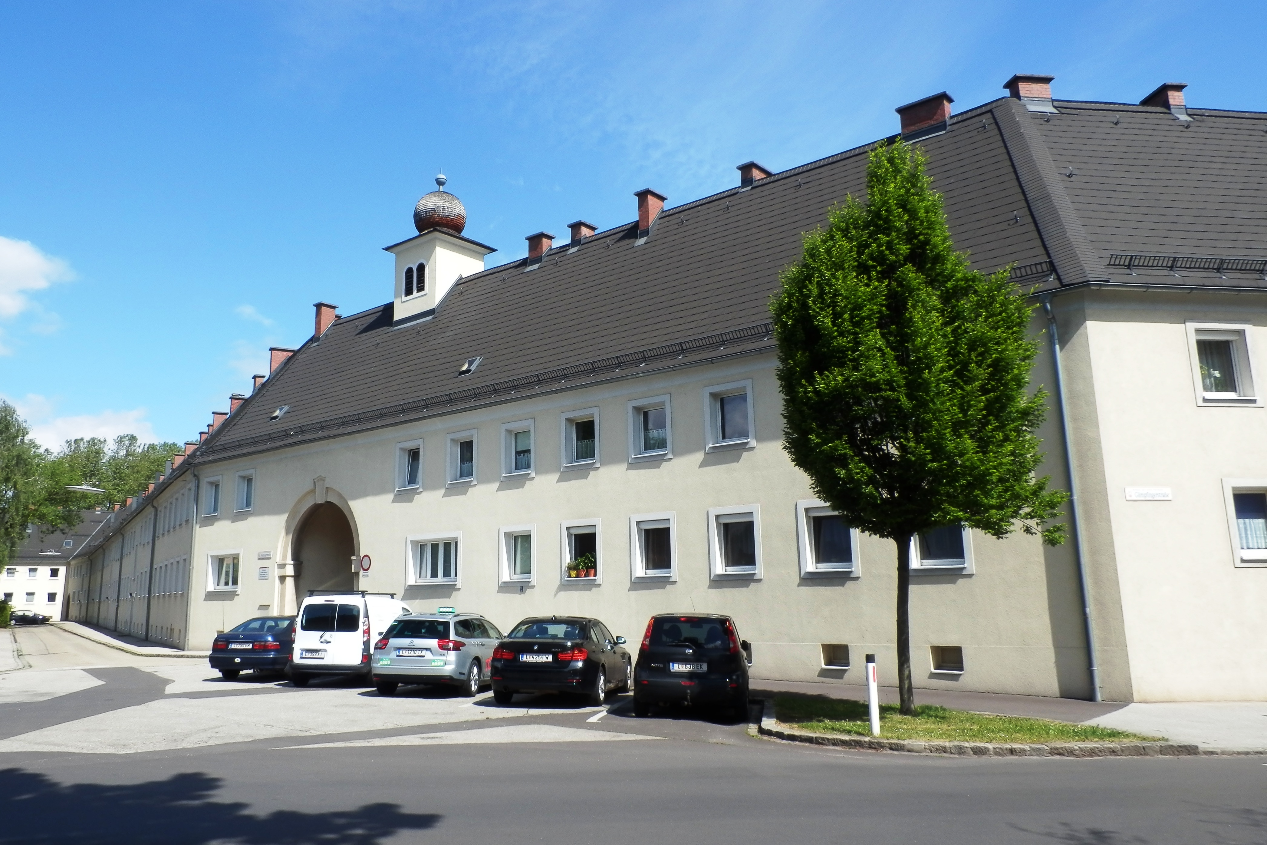 Spallerhofsiedlung - Waldingerstraße / Glimpfingerstraße